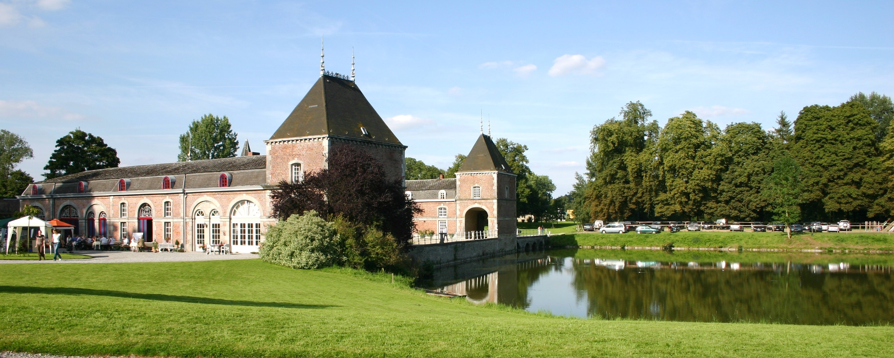 Schlass Barvaux d'Dependance vu Weste gesinn.